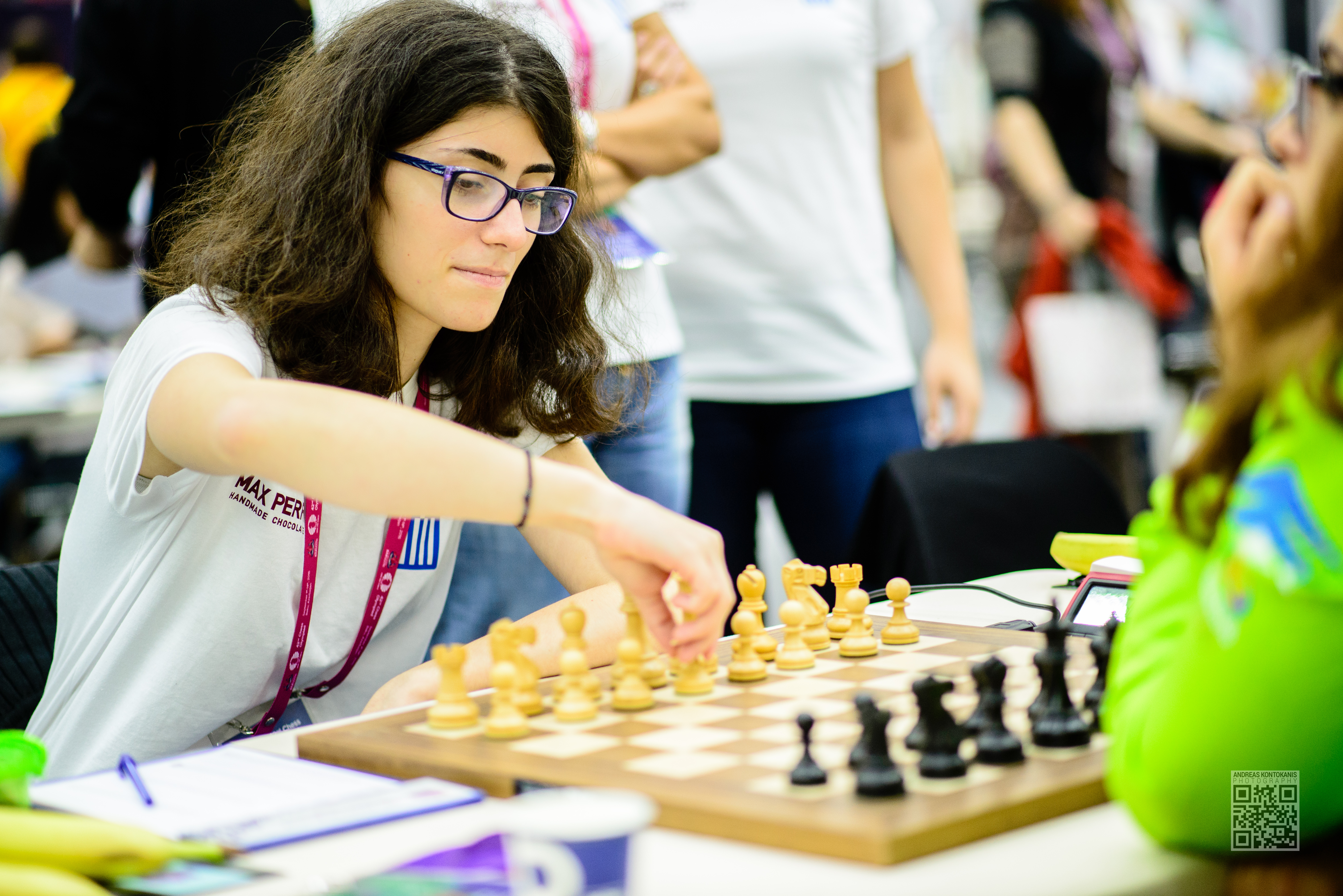 Avramidou Anastasia